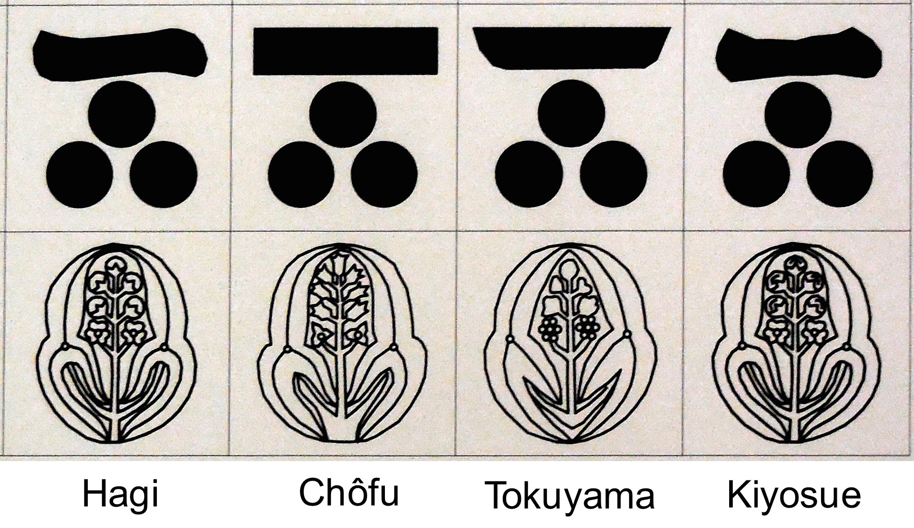 一文字三つ星と抱き沢瀉